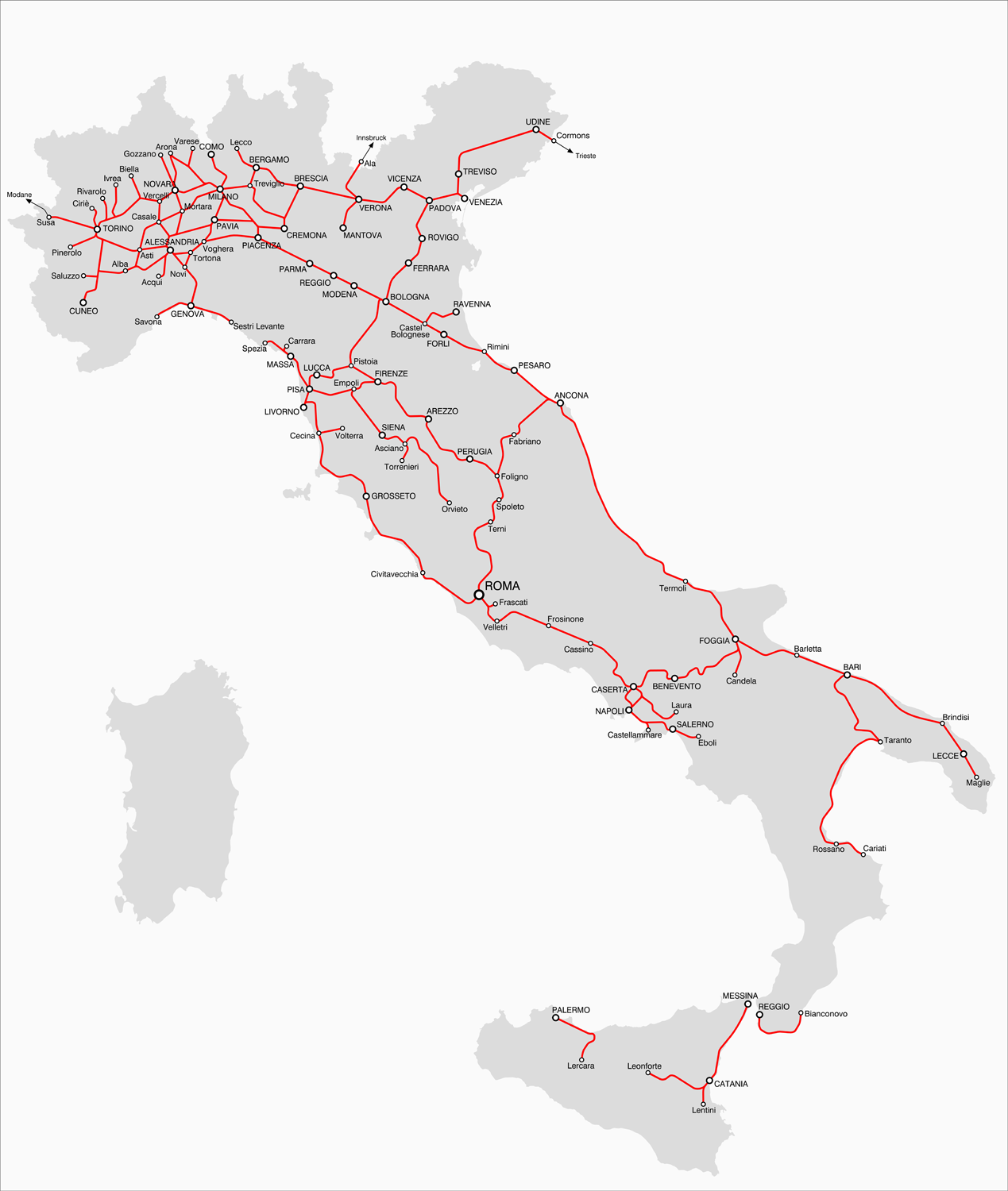 La rete ferroviaria italiana al 20 settembre 1870. Dati tratti dal Prospetto cronologico dei tratti di ferrovia aperti all'esercizio dal 1839 al 31 dicembre 1926.